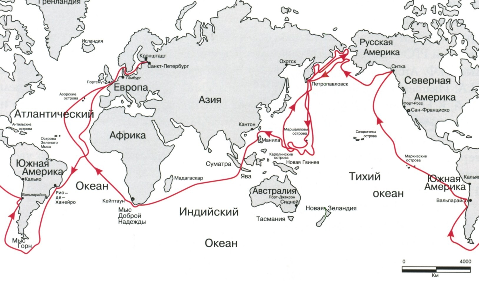 карта экспедиции Ф.Литке